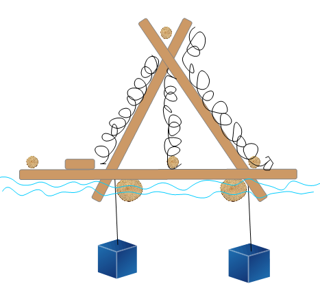 Schwimmendes Seehindernis Nas, Vitznau LU, Schweiz